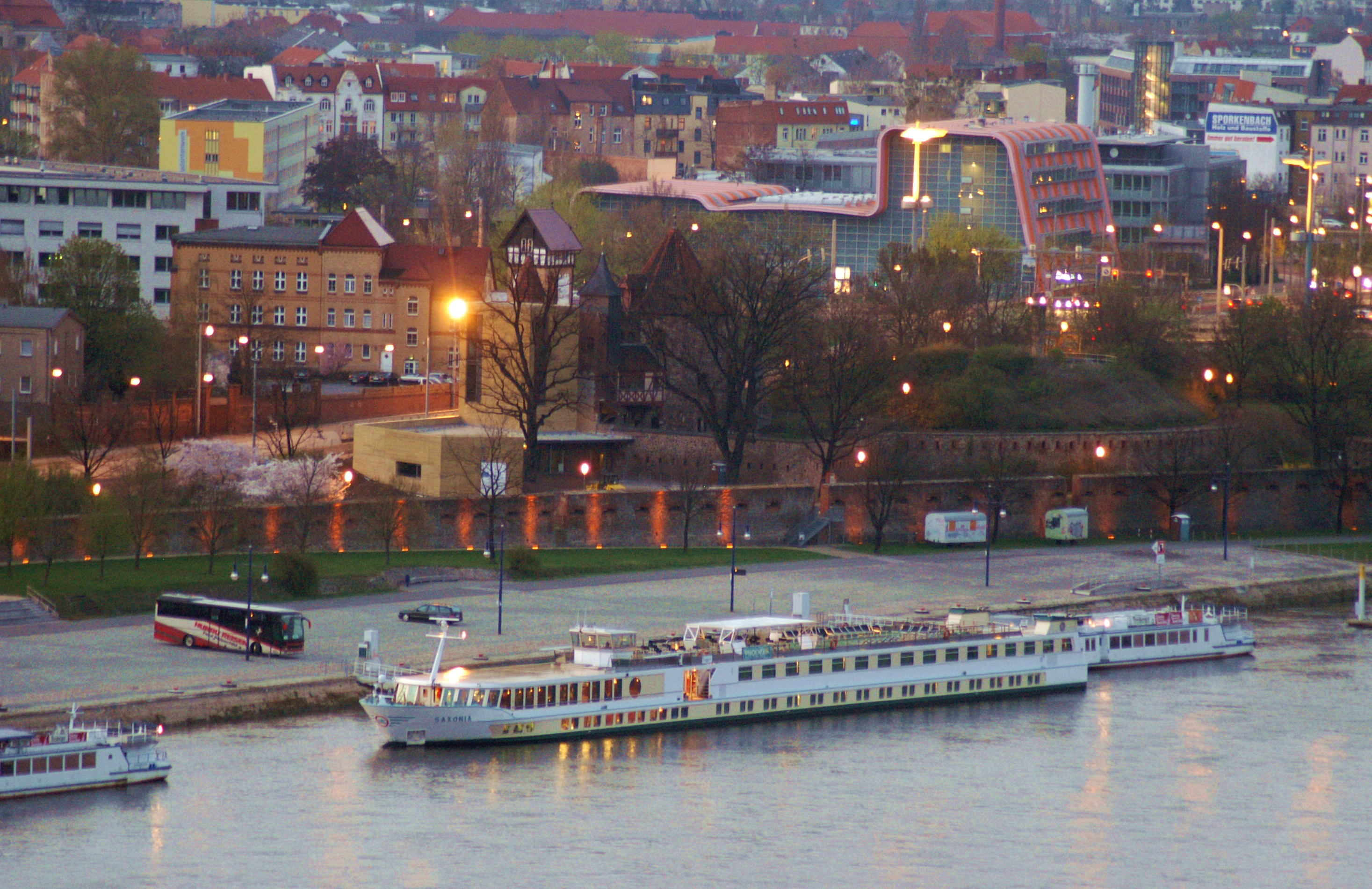 Saxonia bei Dämmerung in Magdeburg.